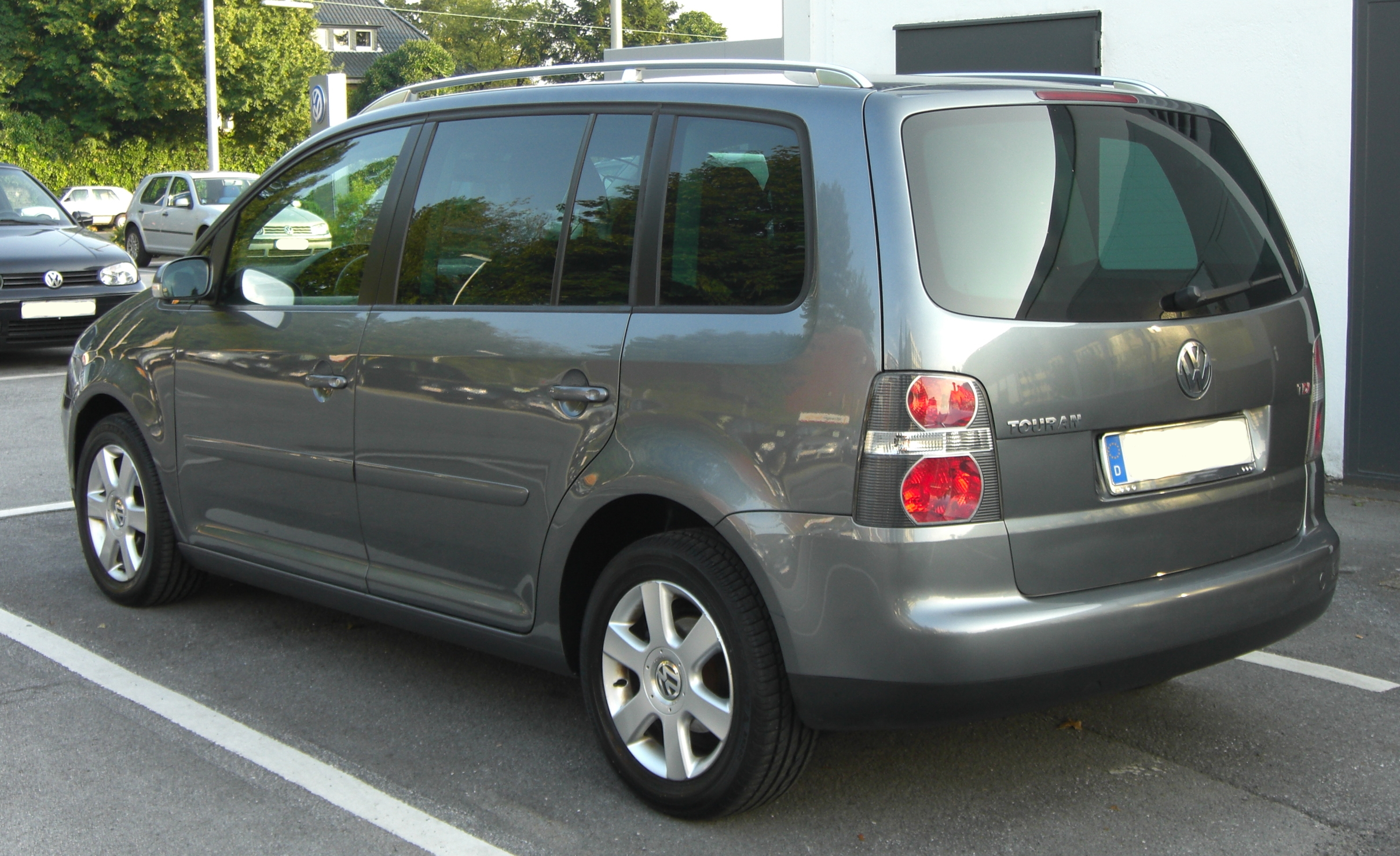 VW Touran